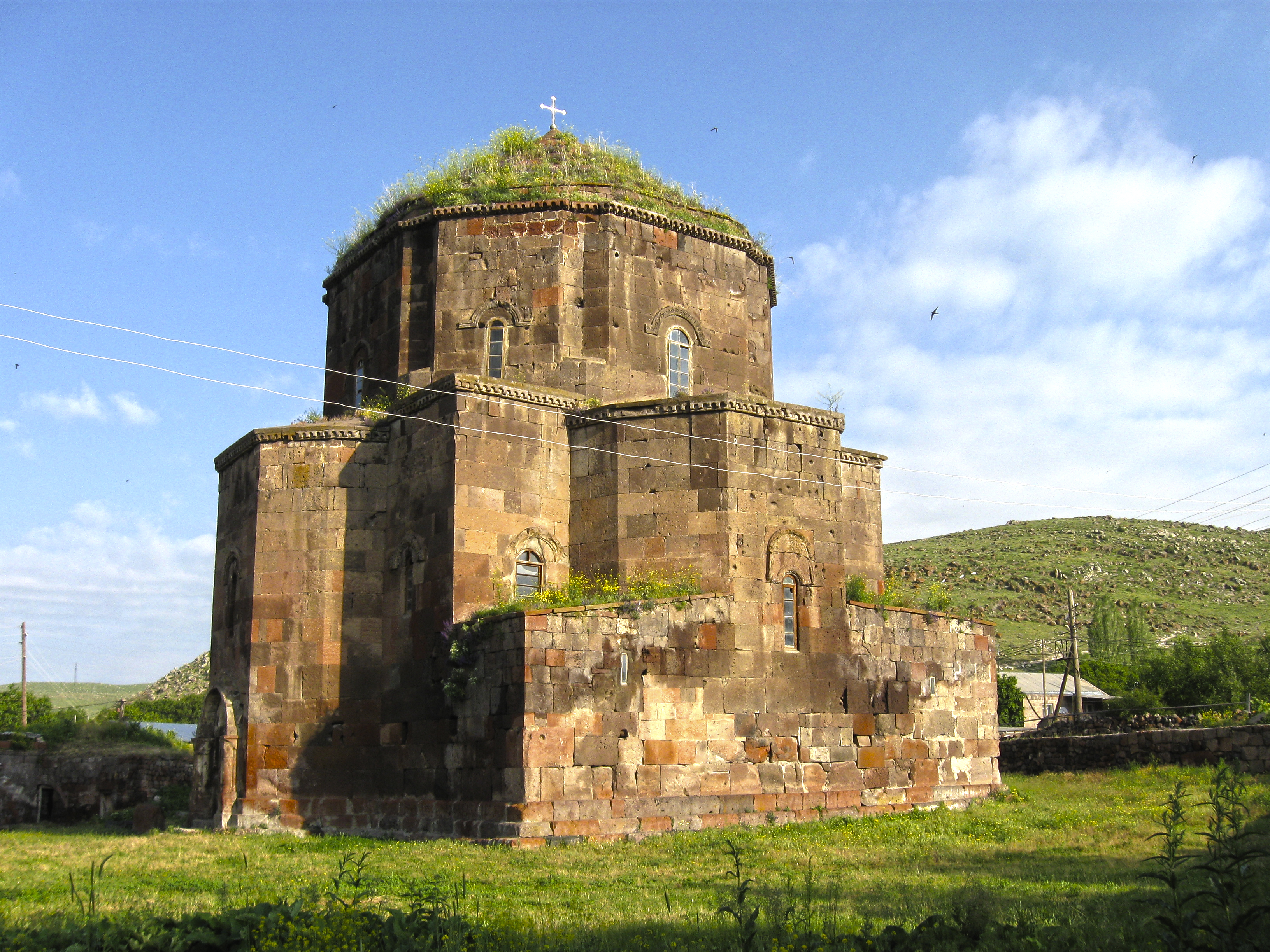 Մաստարայի Սուրբ Հովհաննես եկեղեցին